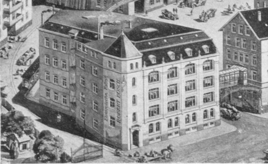 Erste Fabrik von Robert Bosch in der Hoppenlaustraße in Stuttgart, 1906.